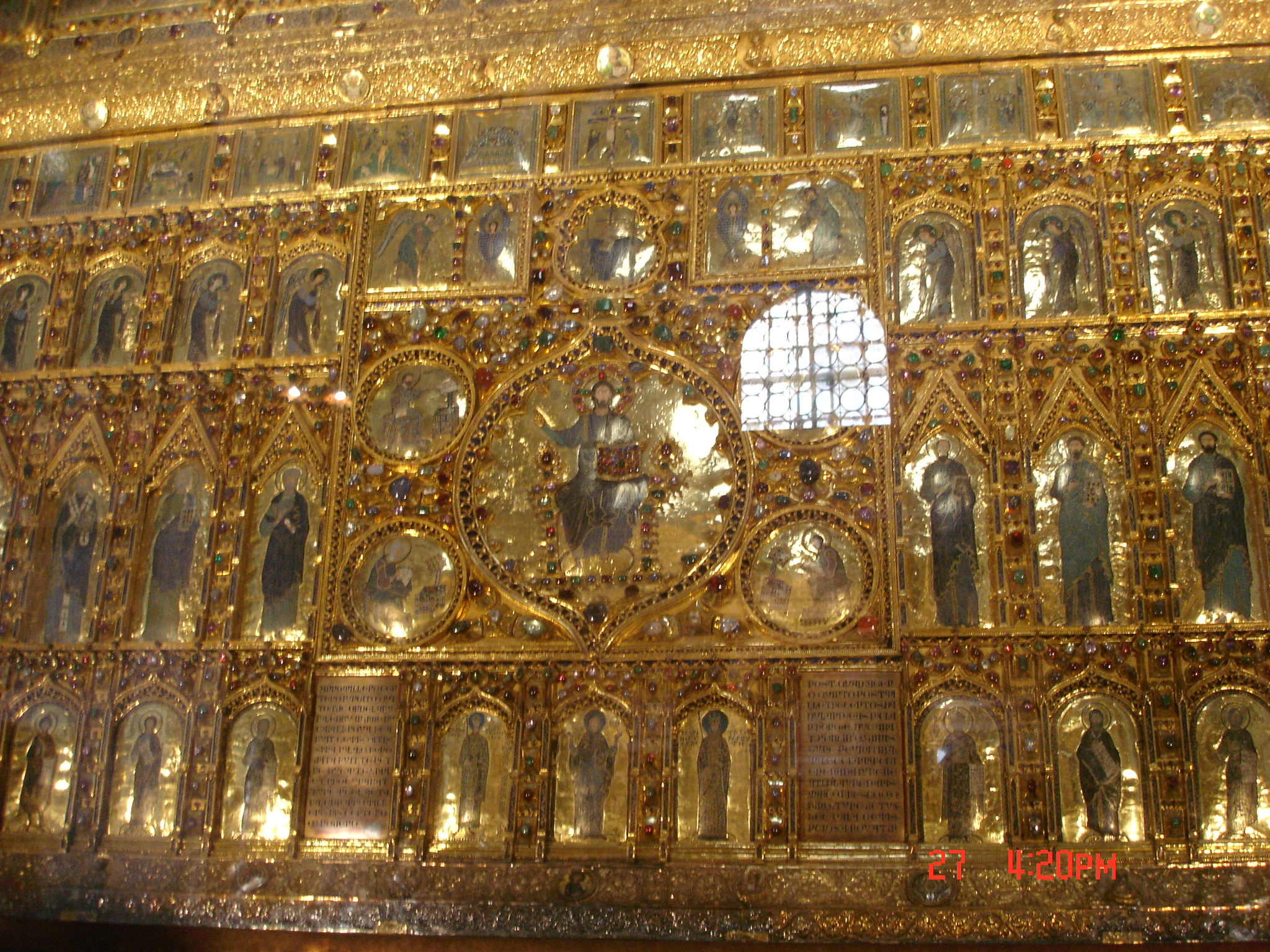 Die Pala_D'Oro